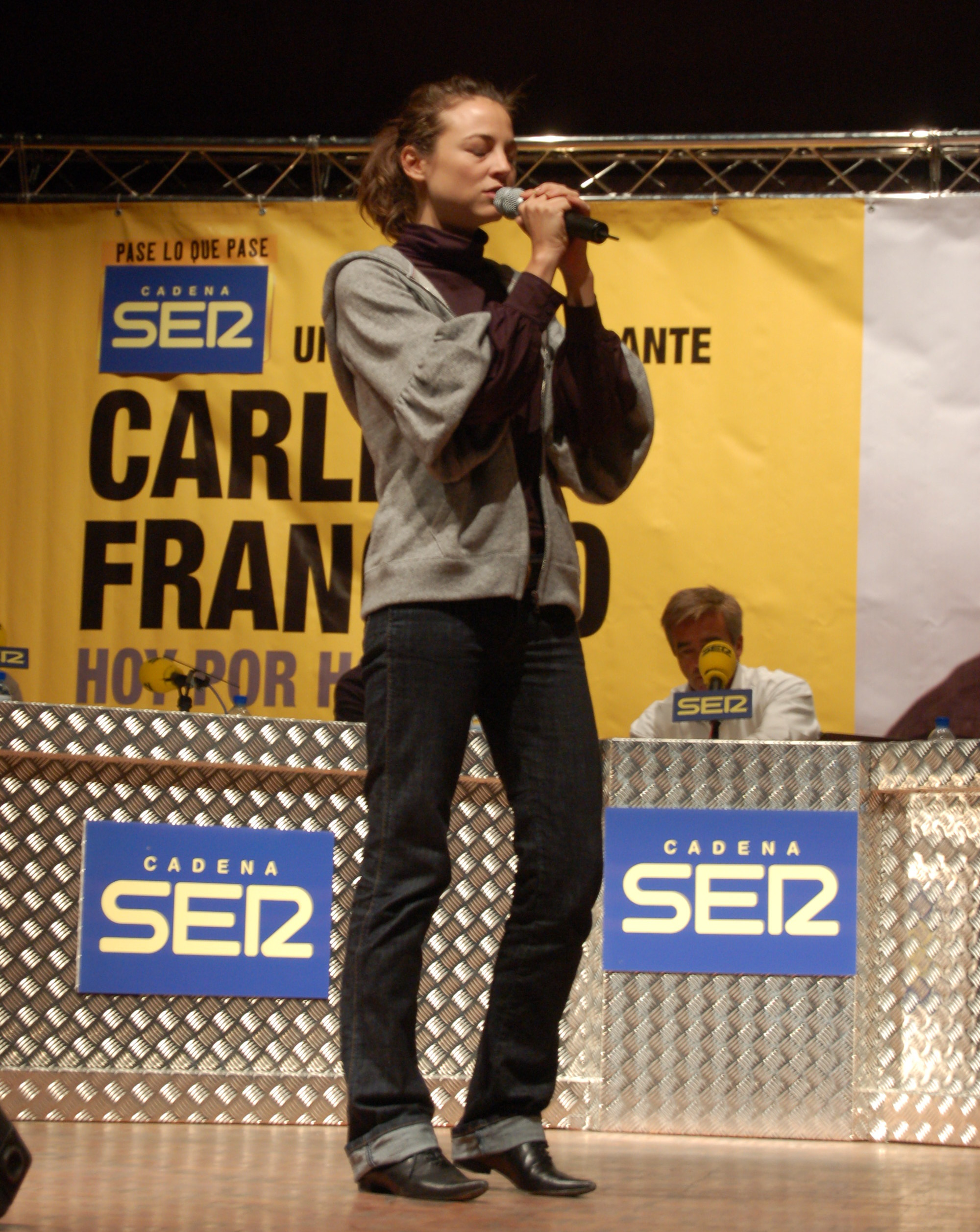 Leonor Watling en Pontevedra